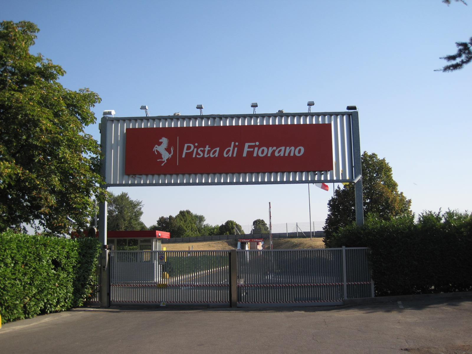 Pista di Fiorano